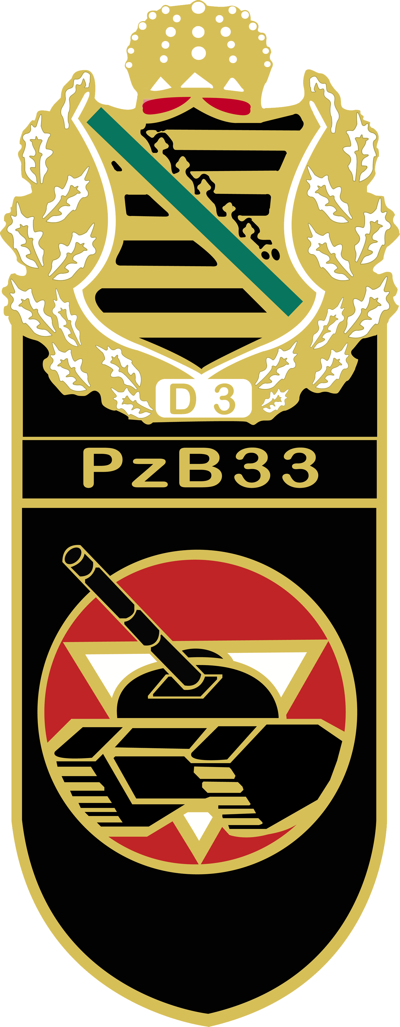 Das Verbandsabzeichen des PzB33, das kgl. sächsische Wappen enthalten